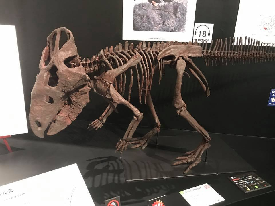 ケラシノプスのホロタイプ